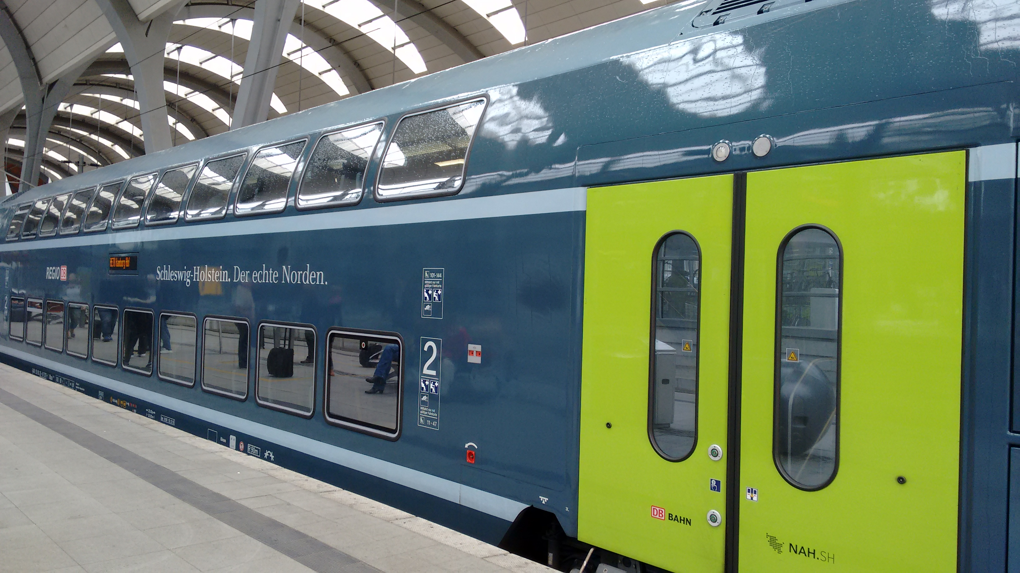 Doppelstockwagen der DB Regionalbahn Schleswig-Holstein im neuen NAH.SH-Design in Kiel Hbf